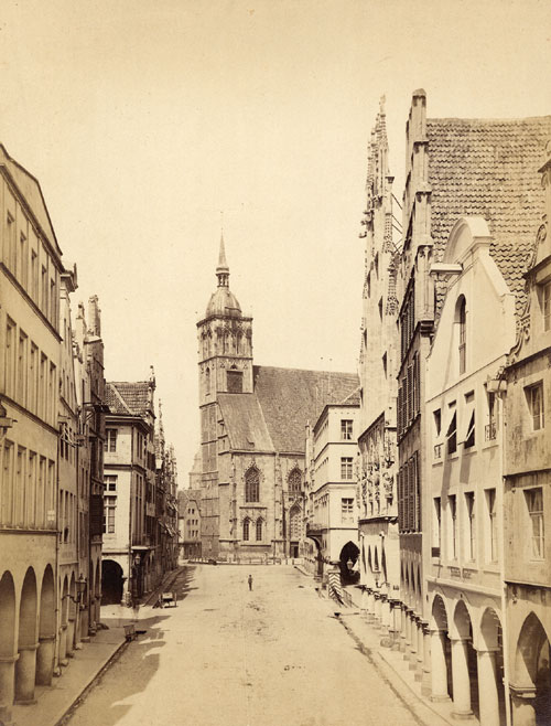 Münster (Westfalen): Prinzipalmarkt und Lambertikirche (vor dem Turmumbau), 1870er Jahre